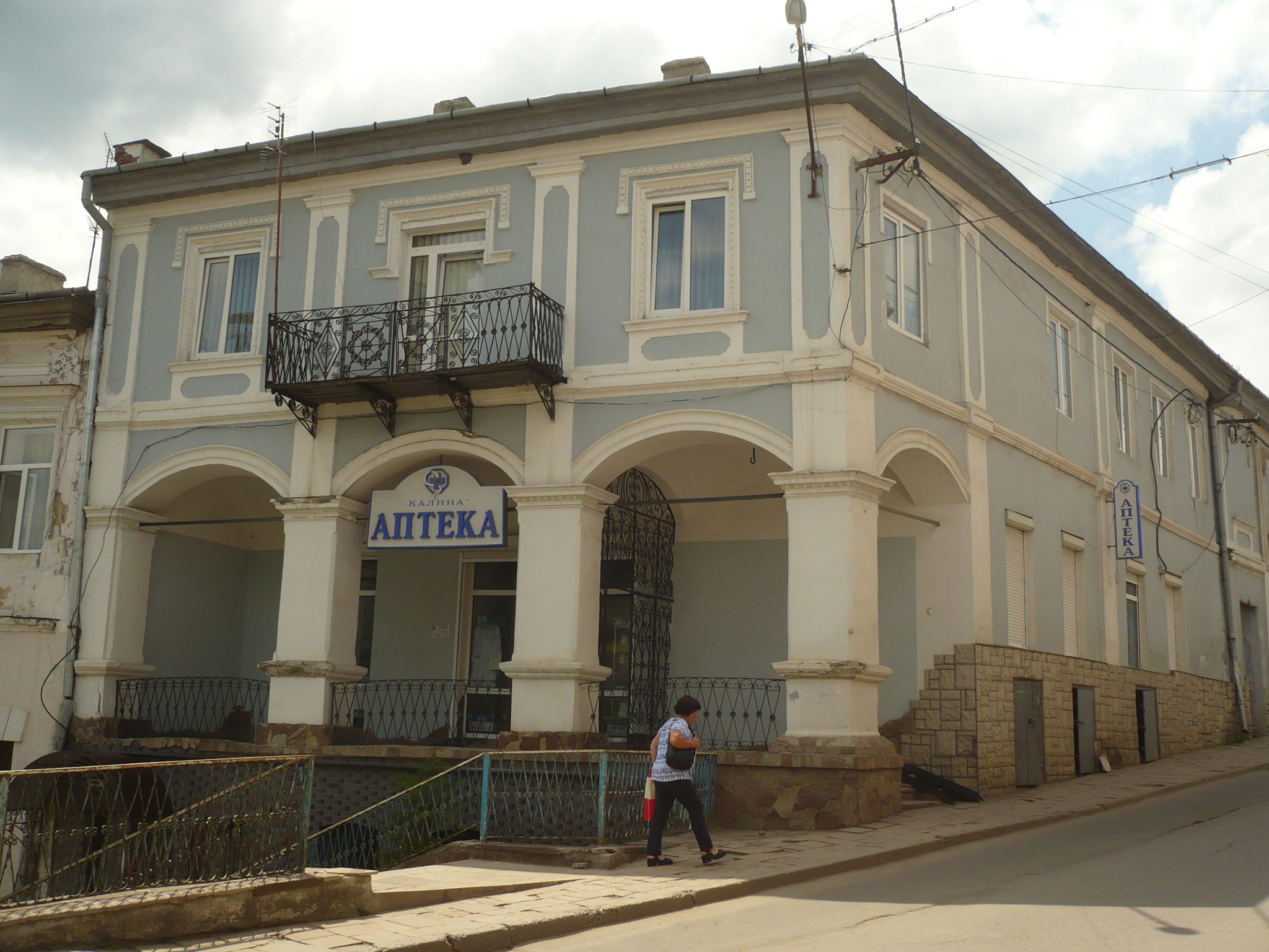 Buczacz, obw. tarnopolski. Apteka, ul. Halicka, 63